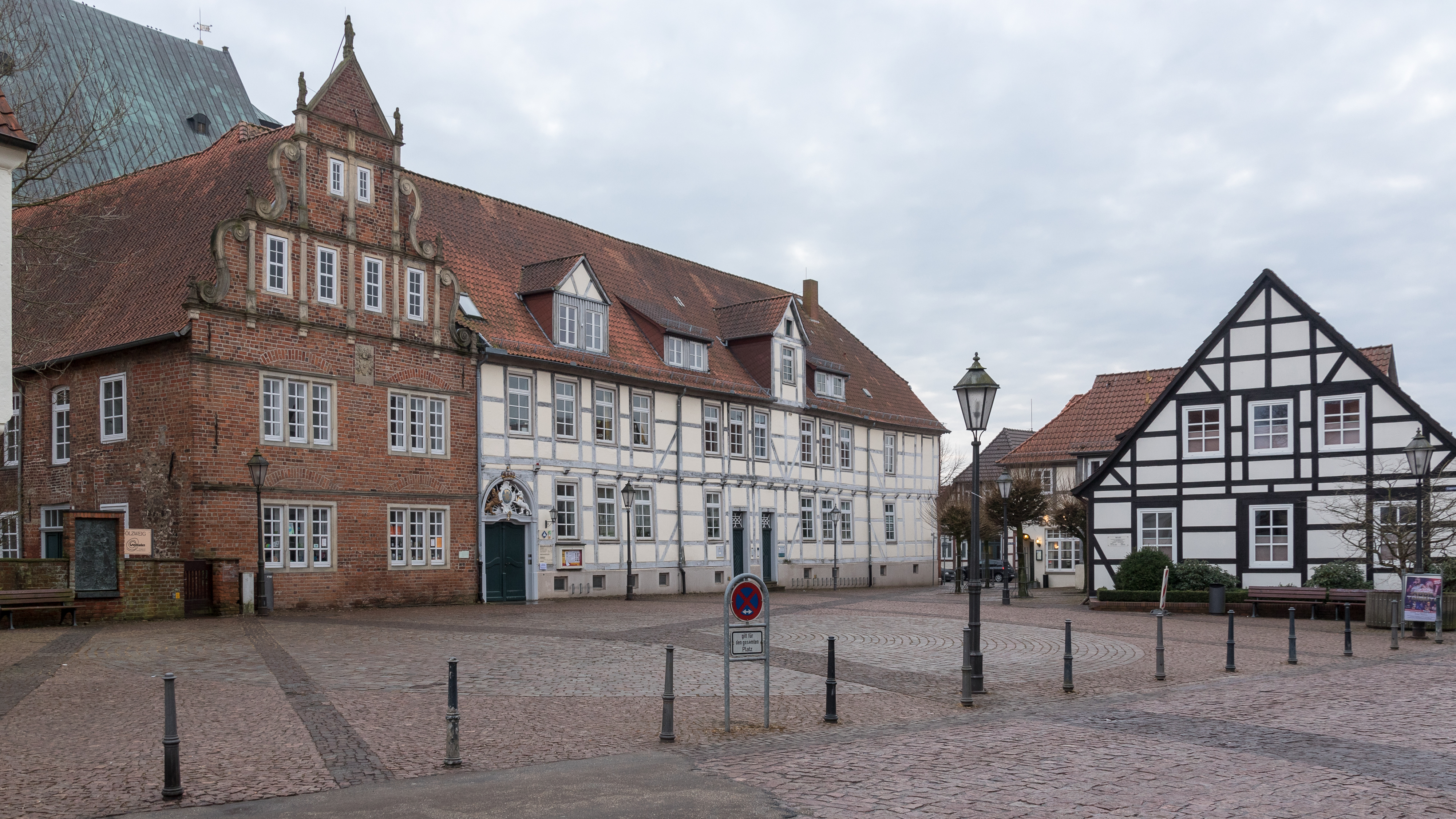 Domvorplatz "Lugenstein" in Verden/Aller (2018)